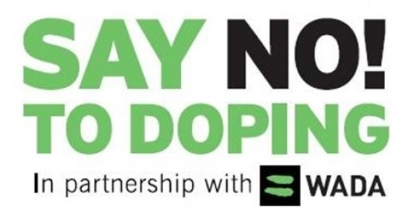 Reči dopingu ne!